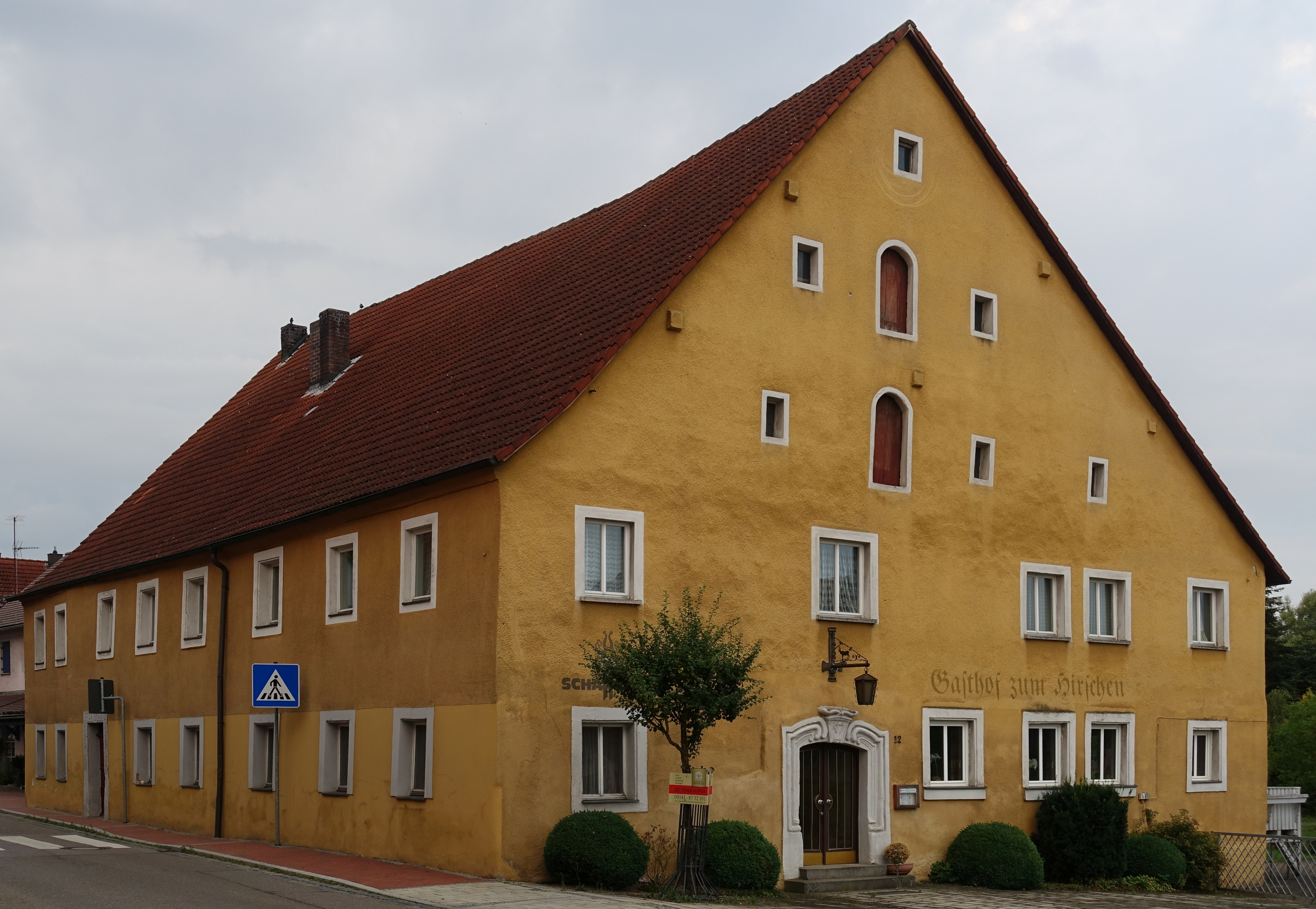 Zweigeschossiger Satteldachbau in Ecklage